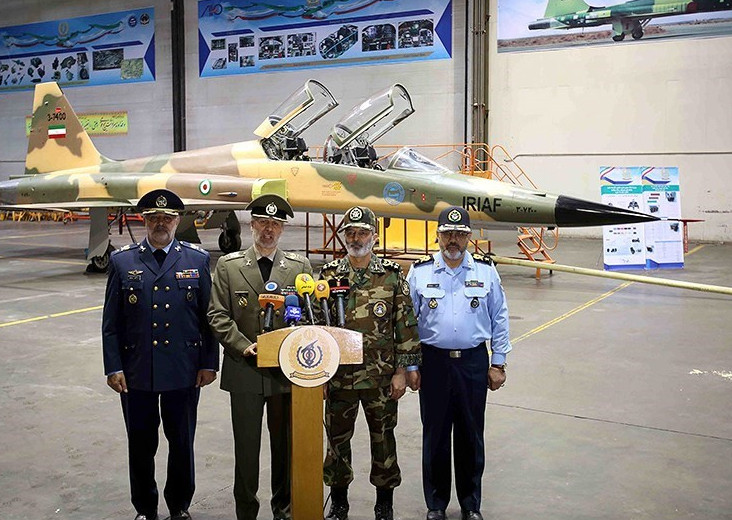 جنگنده کوثر